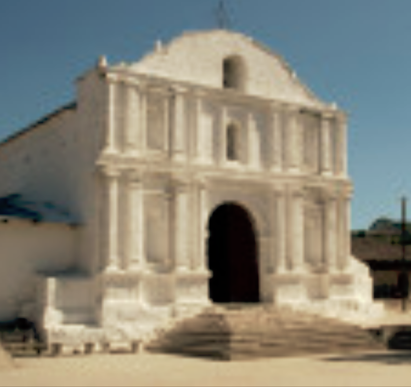 Iglesia Católica Colonial de San Bartolomé Jocotenango